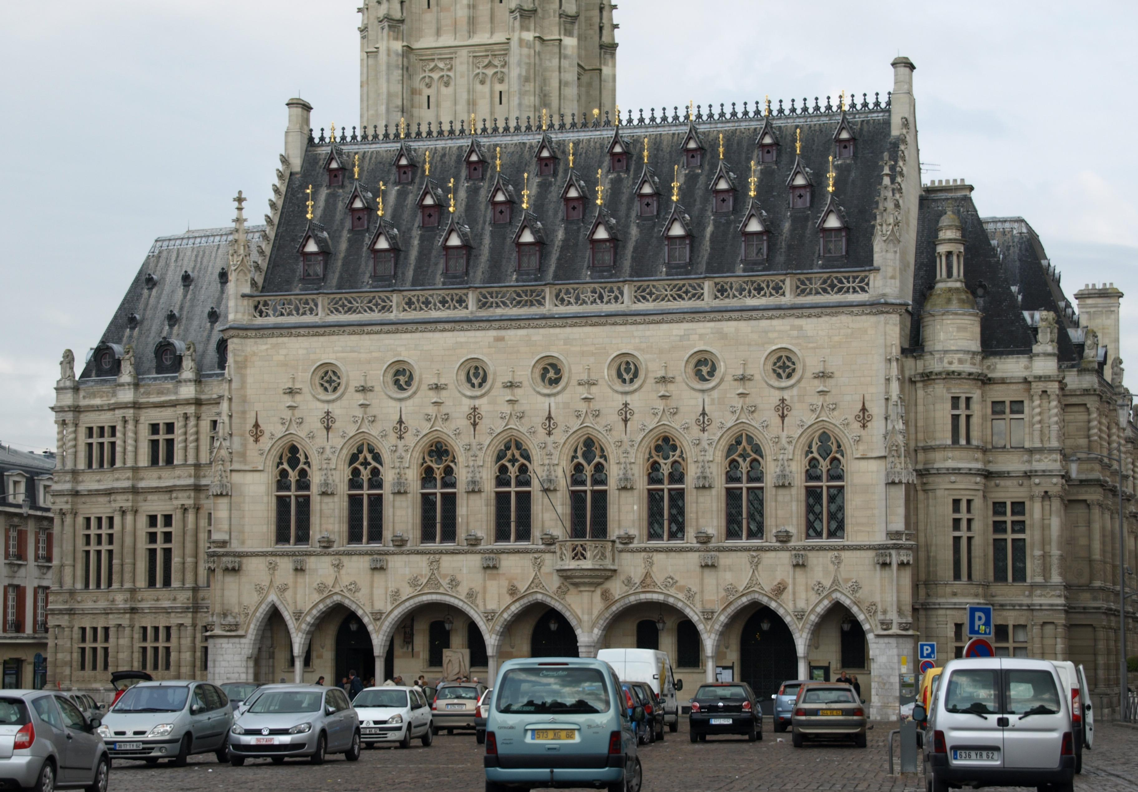 La façade sud-est de l'Hôtel de Ville d'Arras (Pas-de-Calais)